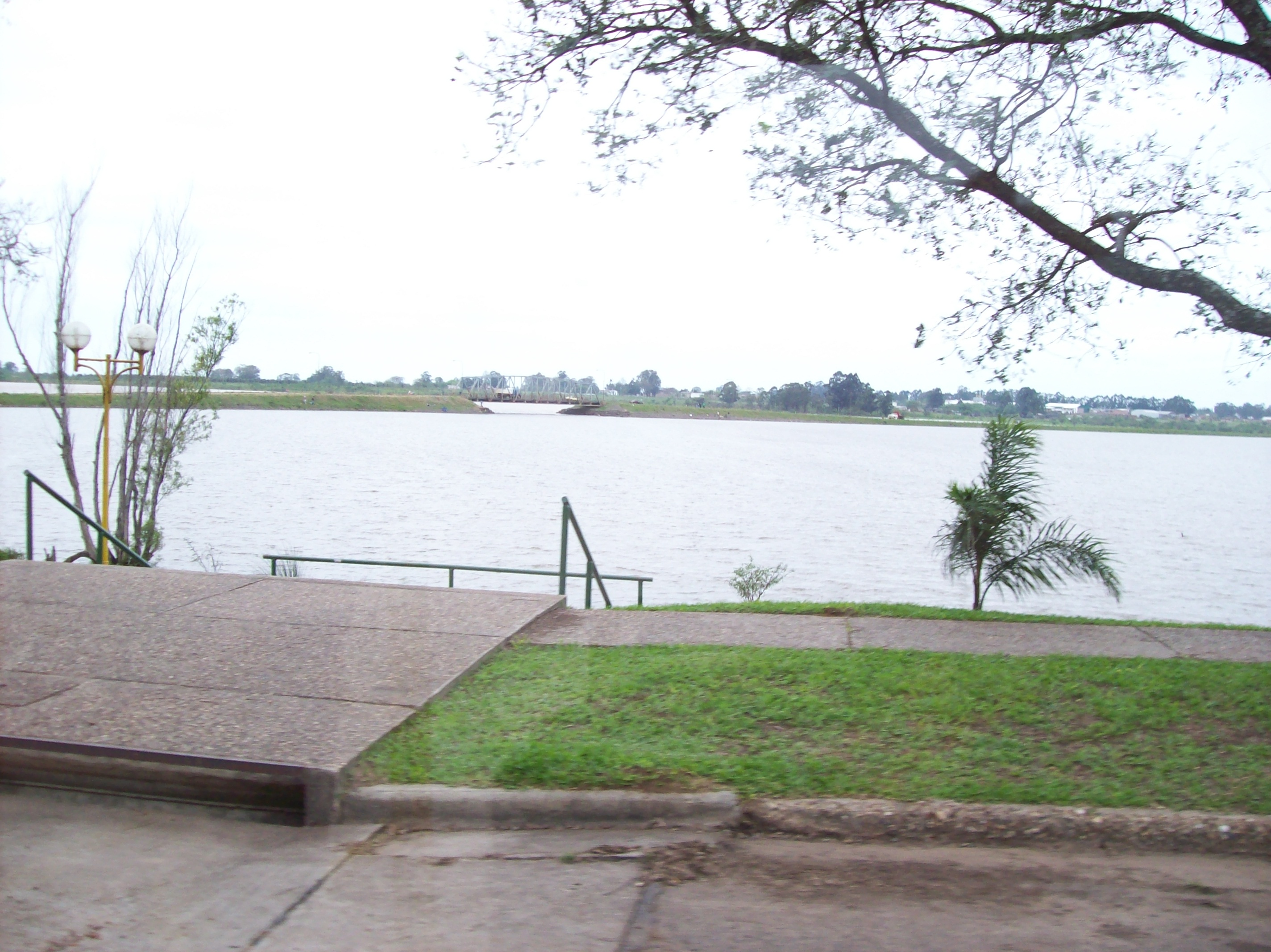 Terraplén que une la vieja y la nueva ciudad de Federación, Entre Ríos, Argentina